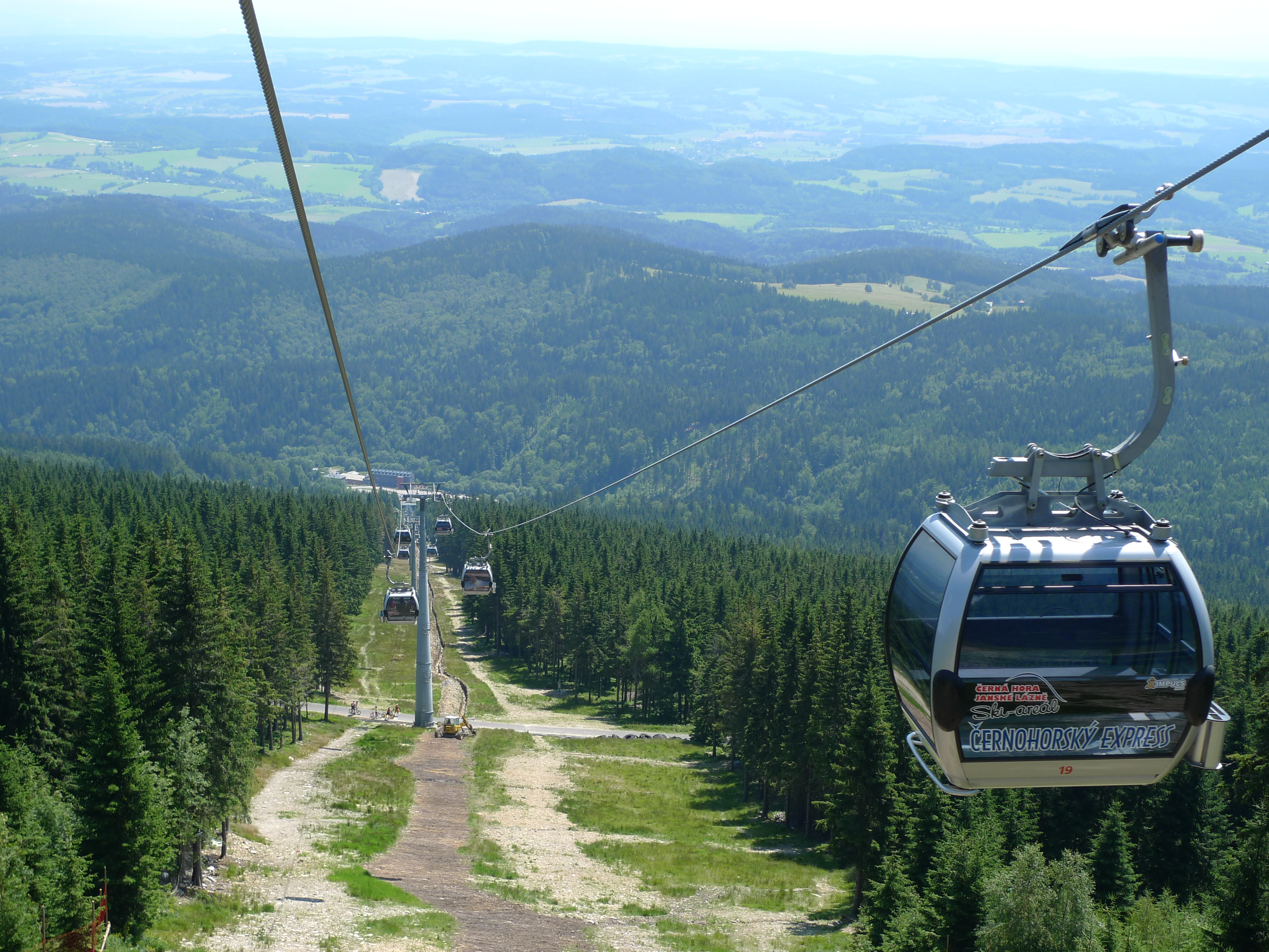 Lanovka na Černou Horu - pohled z kabinky